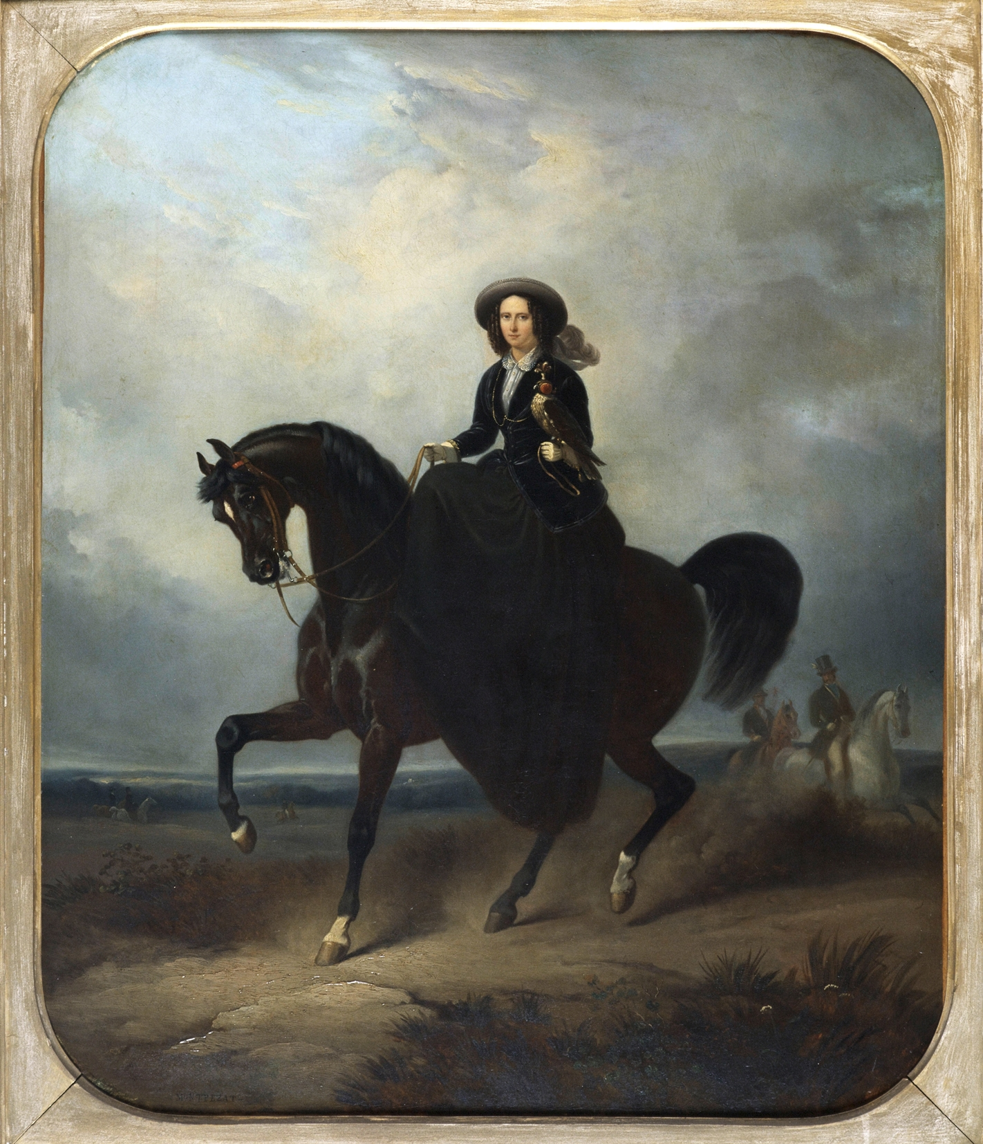 Portret van Sophie, koningin der Nederlanden, prinses van Württemberg (1818-1877), te paard